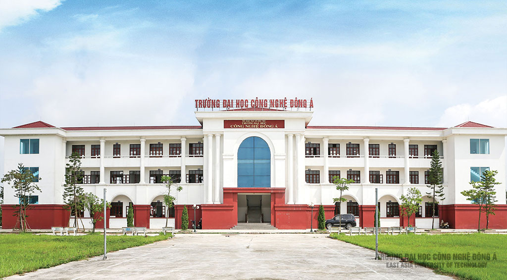 Trường đại học Công nghệ Đông Á ở Bắc Ninh